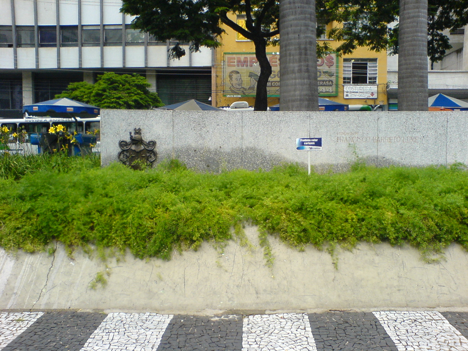 Conceicao, Campinas - State of São Paulo, Brazil